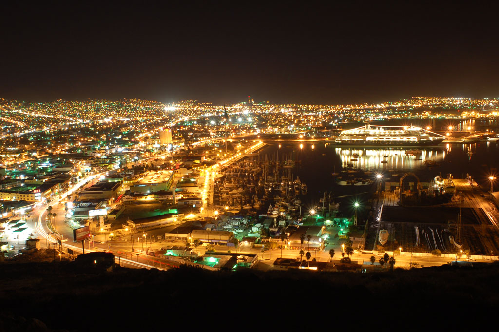 Ensenada, Mexico at night